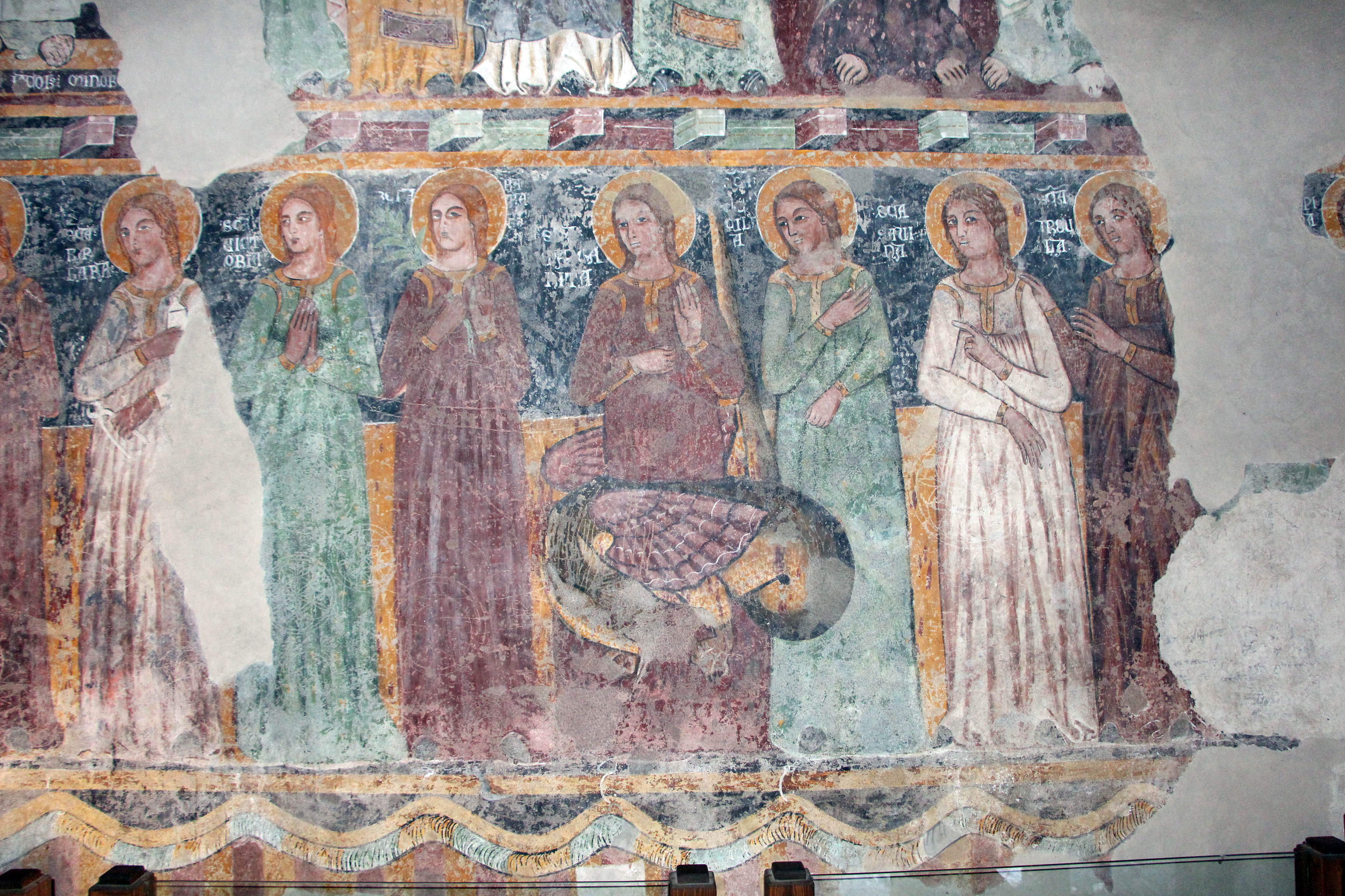 Castello Malaspina The making of this document was supported by Wikimedia CH. (Submit your project!) For all the files concerned, please see the category Supported by Wikimedia CH. This is a photo of a monument which is part of cultural heritage of Italy.